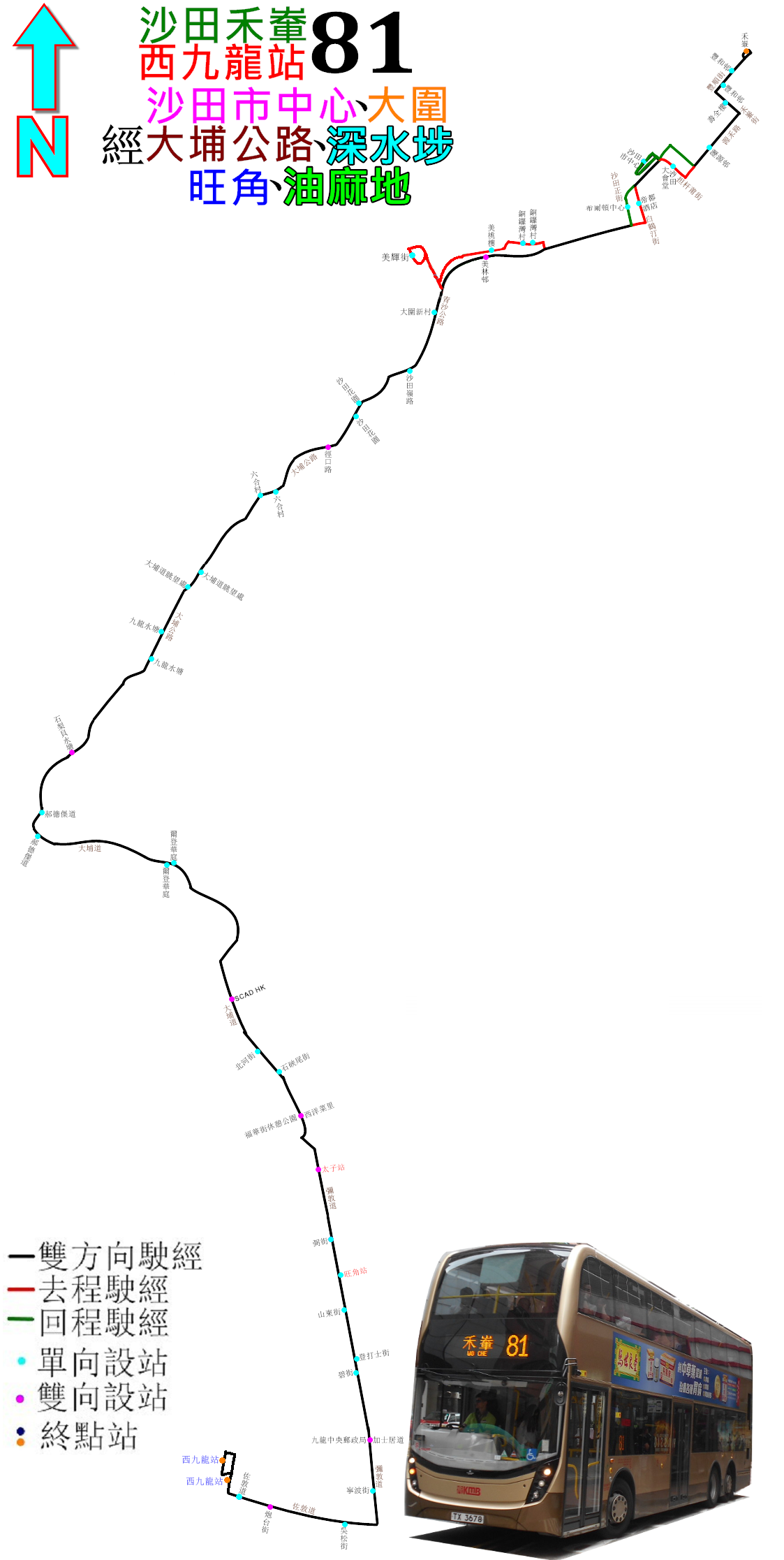 中文（香港）: 九巴81線的走線圖